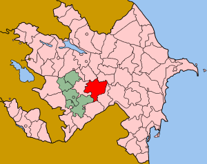 Map of Azerbaijan showing Agjabadi (Ağcabədi) rayon.